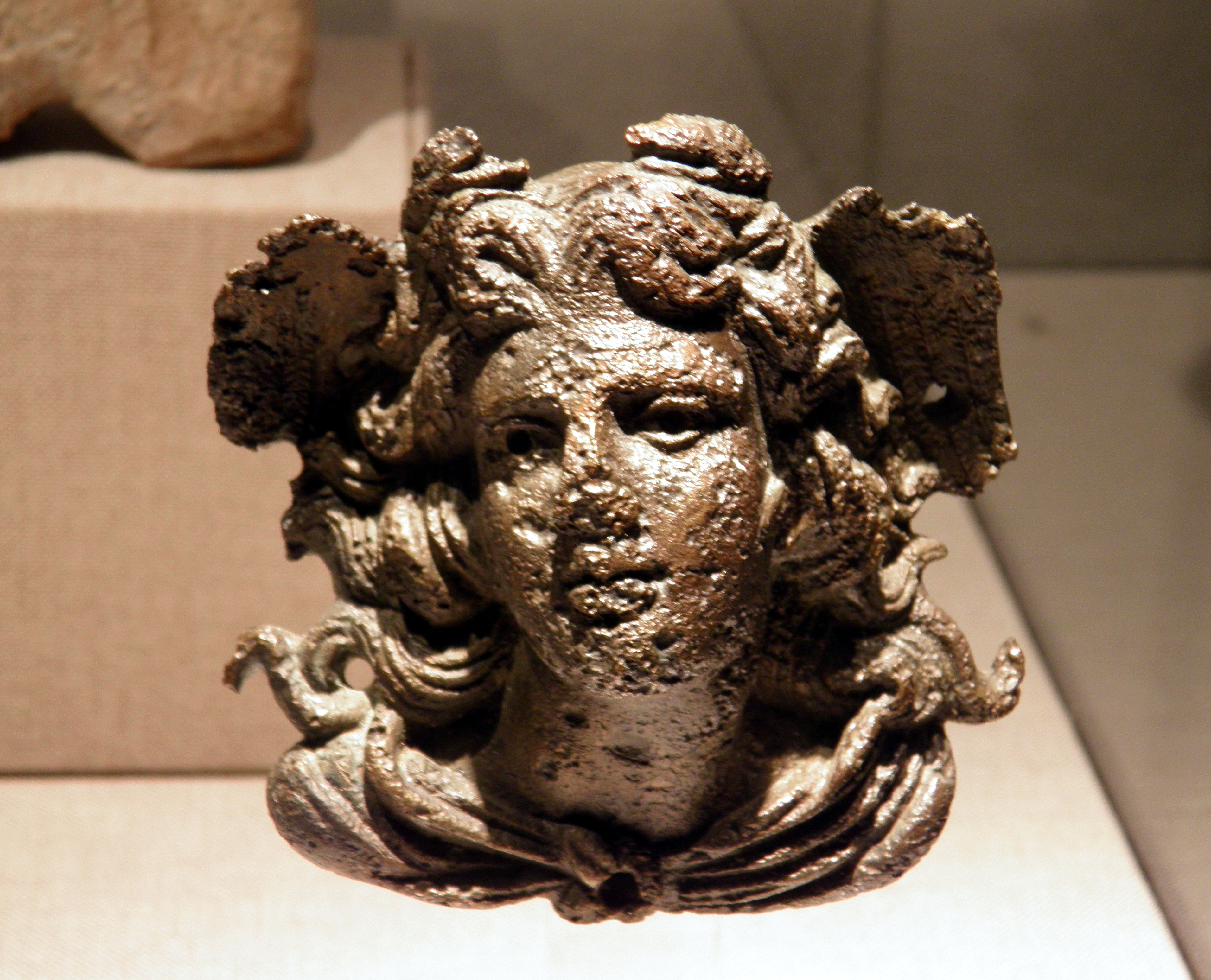 Bronze ornement of Medusa, Romisch-Germanisches Museum, Cologne